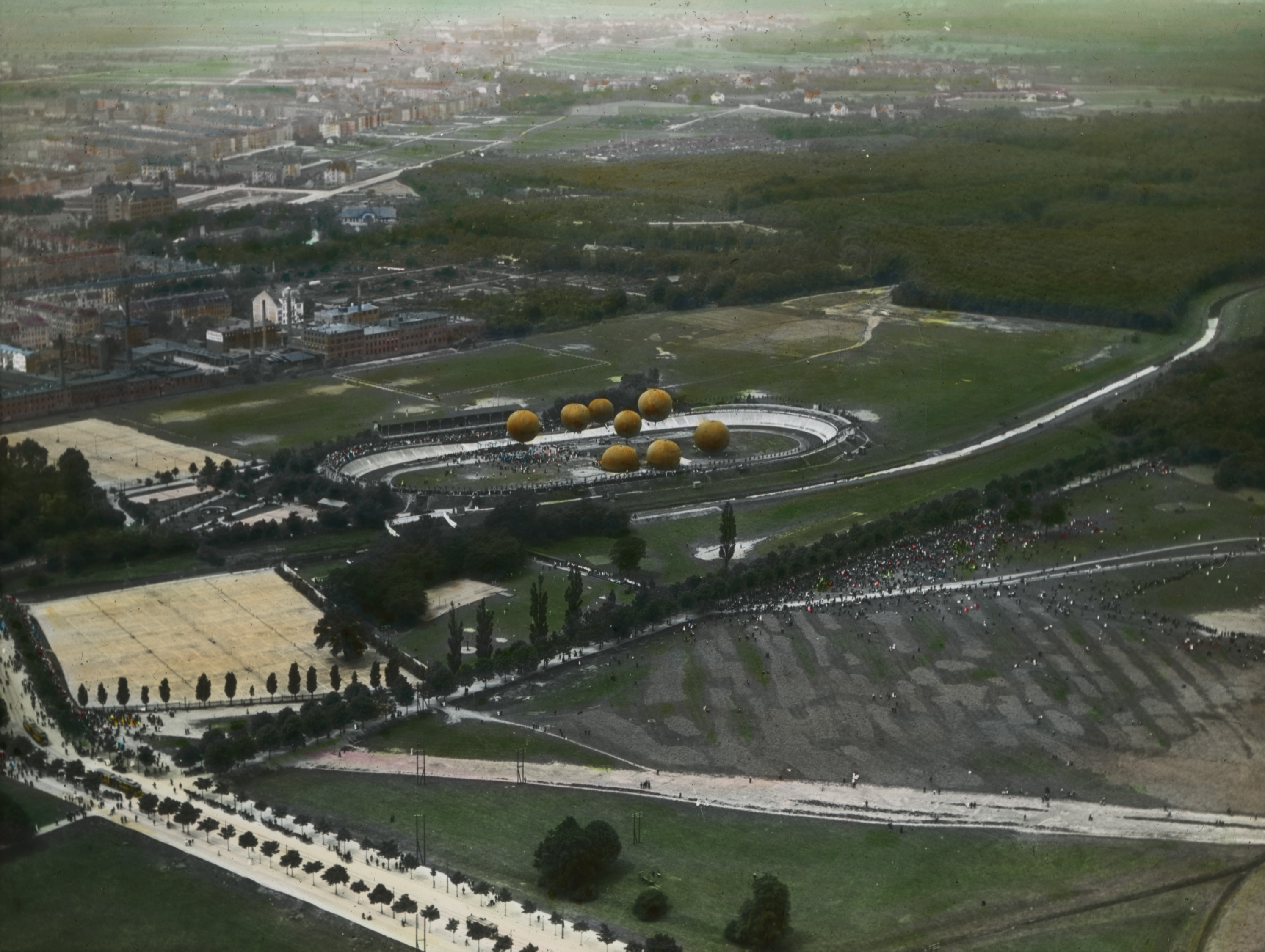 Balllonflüge auf dem Sportplatz Leipzig, um 1912.